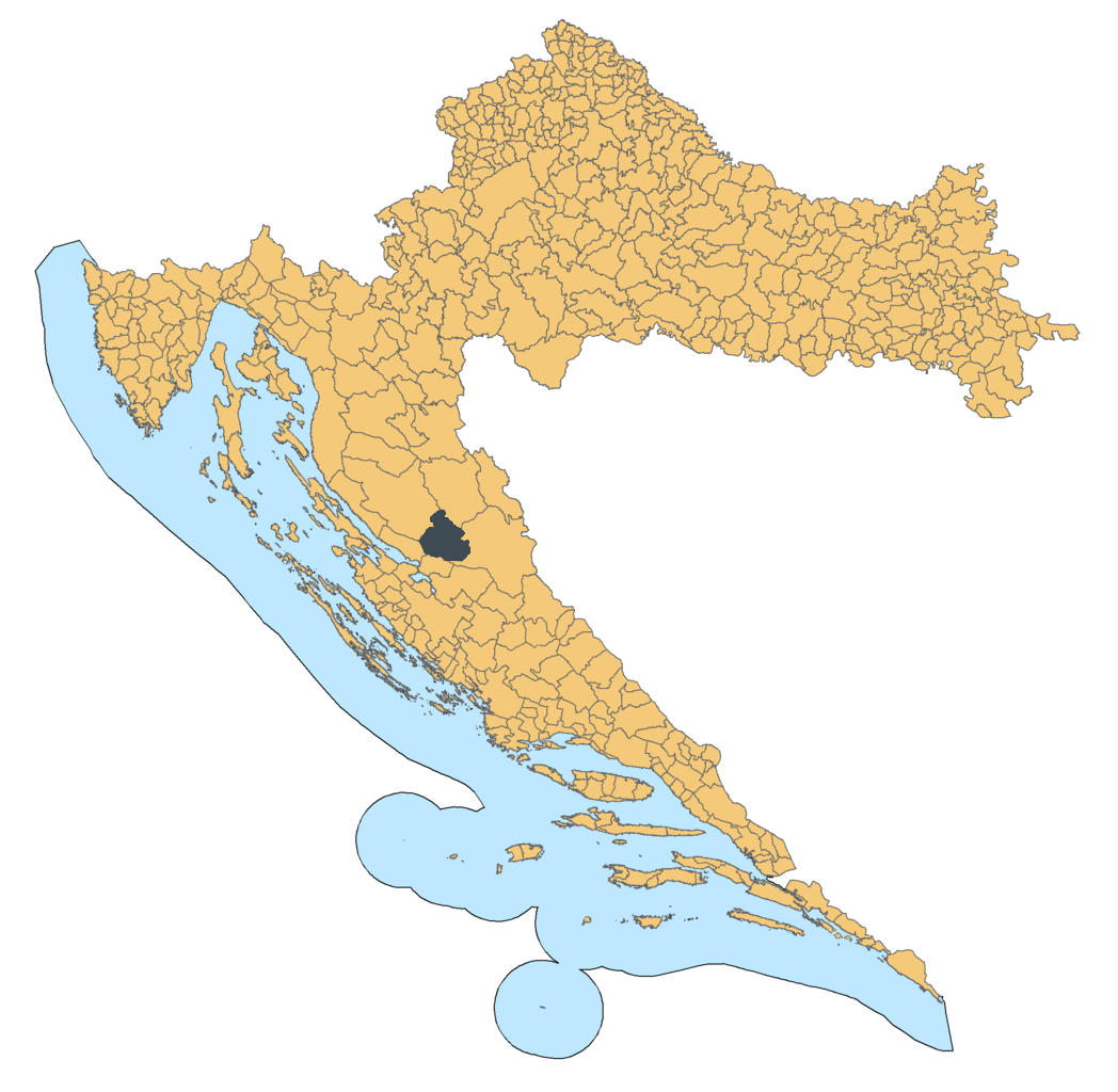 Општина Ловинац на мапи Хрватске